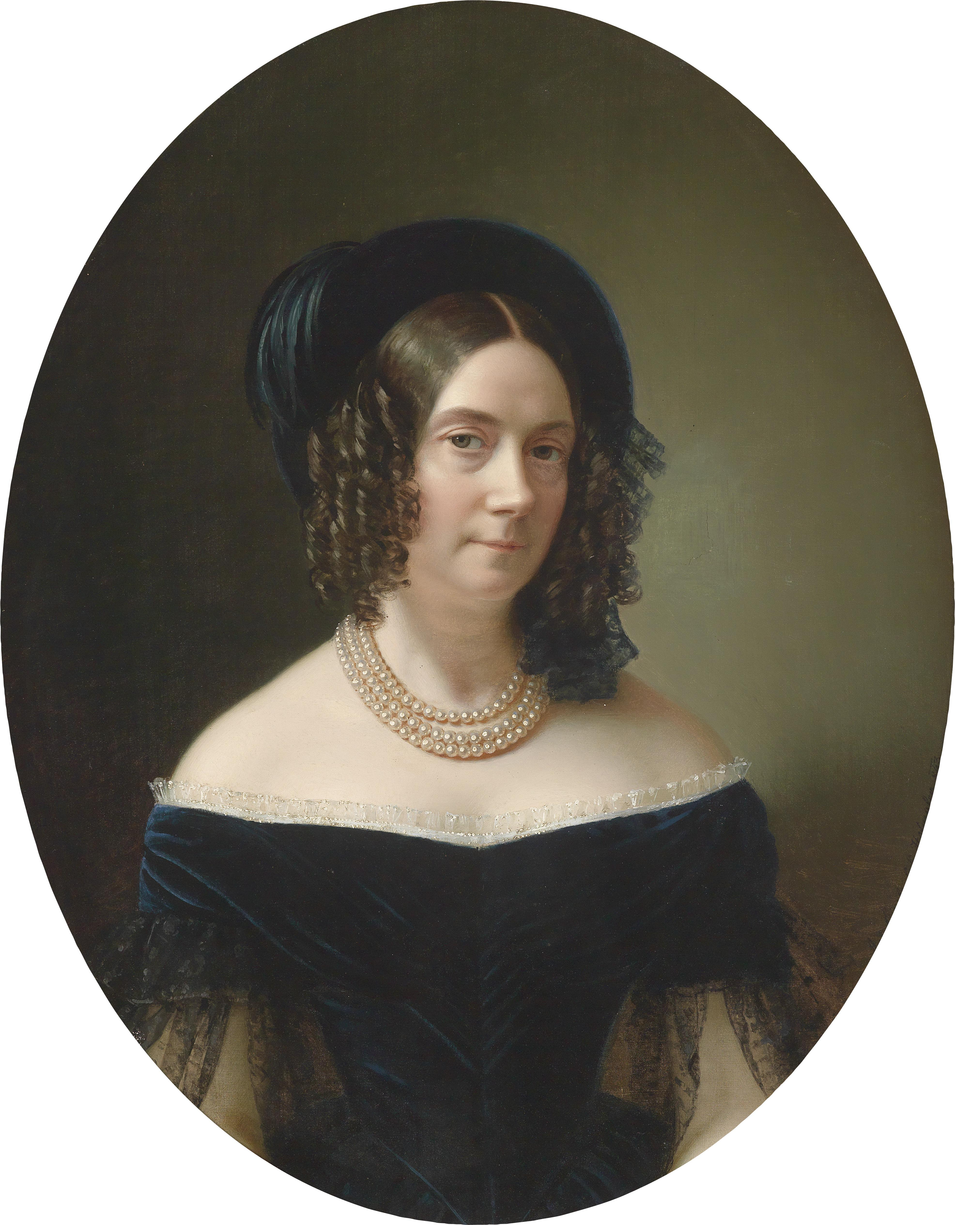 Bildnis einer Dame in blauem Kleidtitle QS:P1476,de:"Bildnis einer Dame in blauem Kleid"